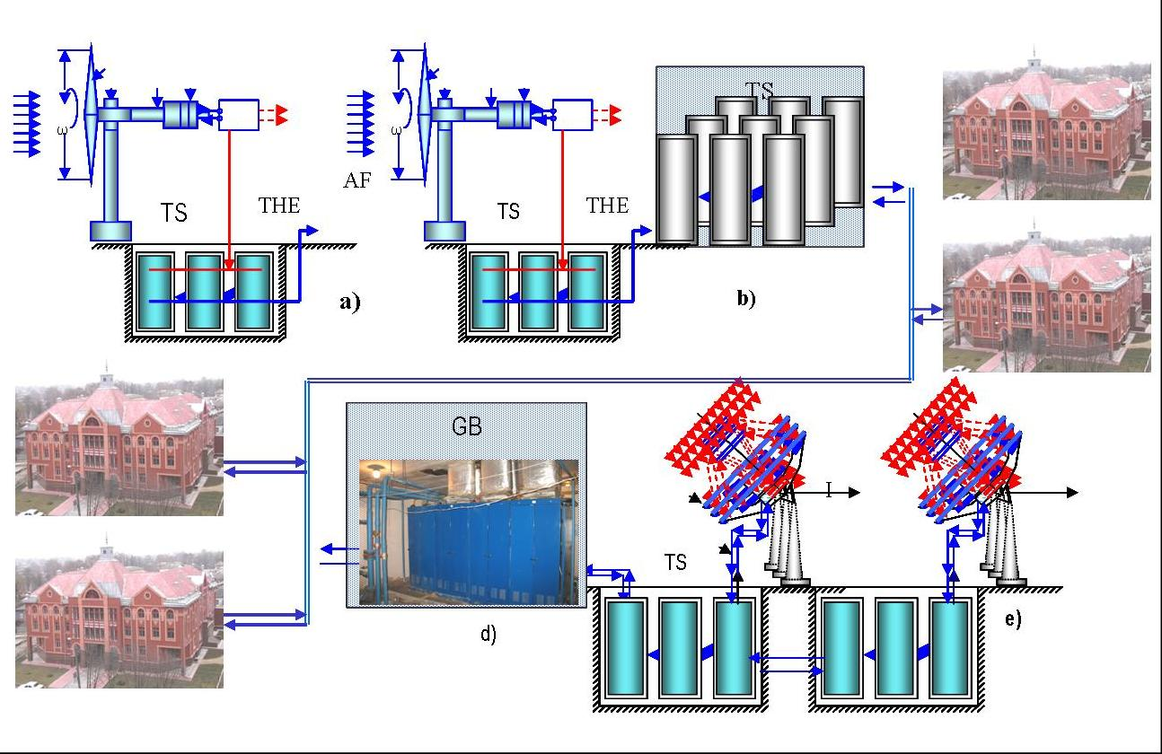 Багатосекційна вітротурбінна система теплопостачання мікрорайону, яка комбінована з сонячною системою теплопостачання